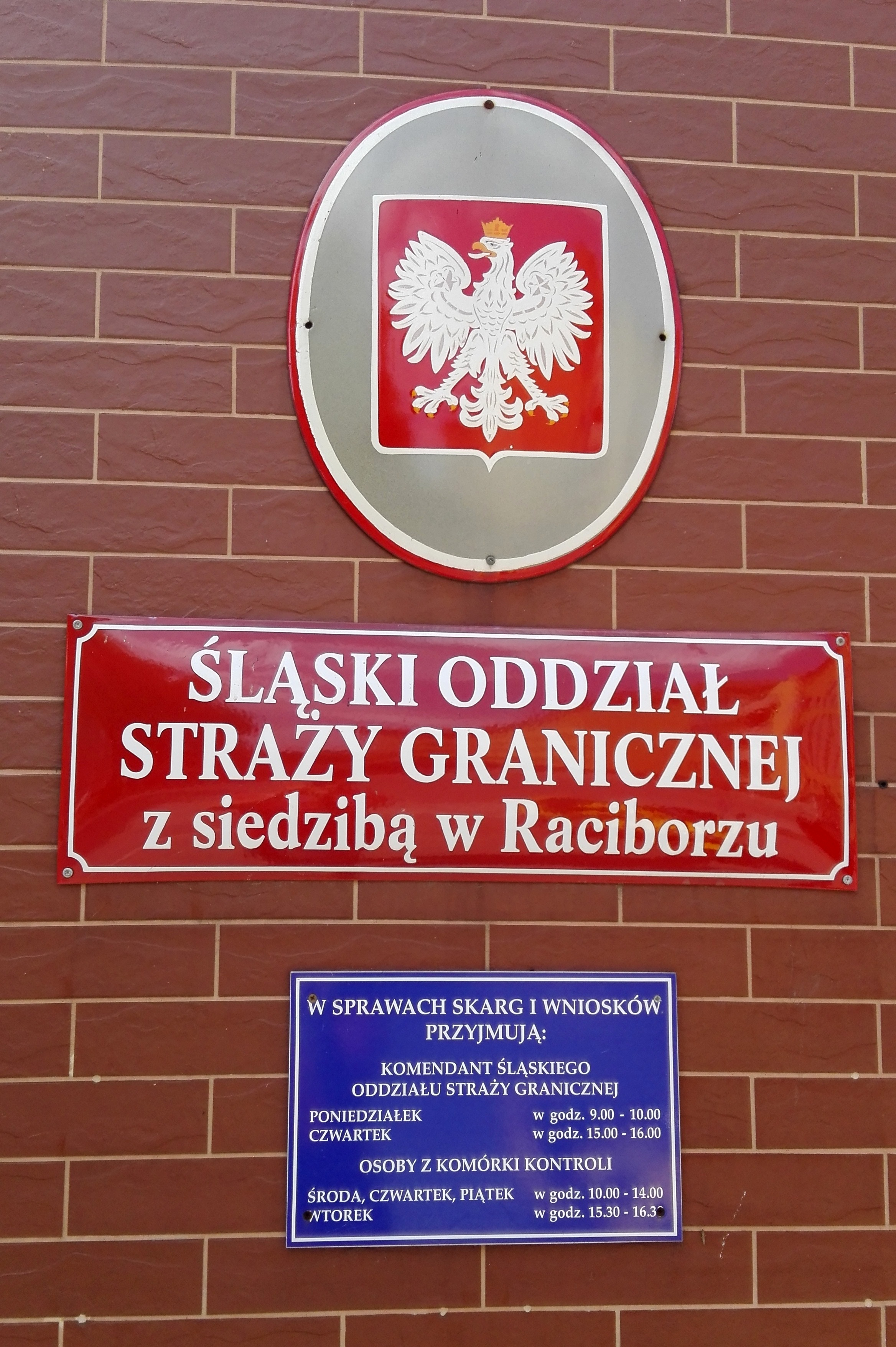 Komenda Śląskiego Oddziału Straży Granicznej w Raciborzu — tablice informacyjne